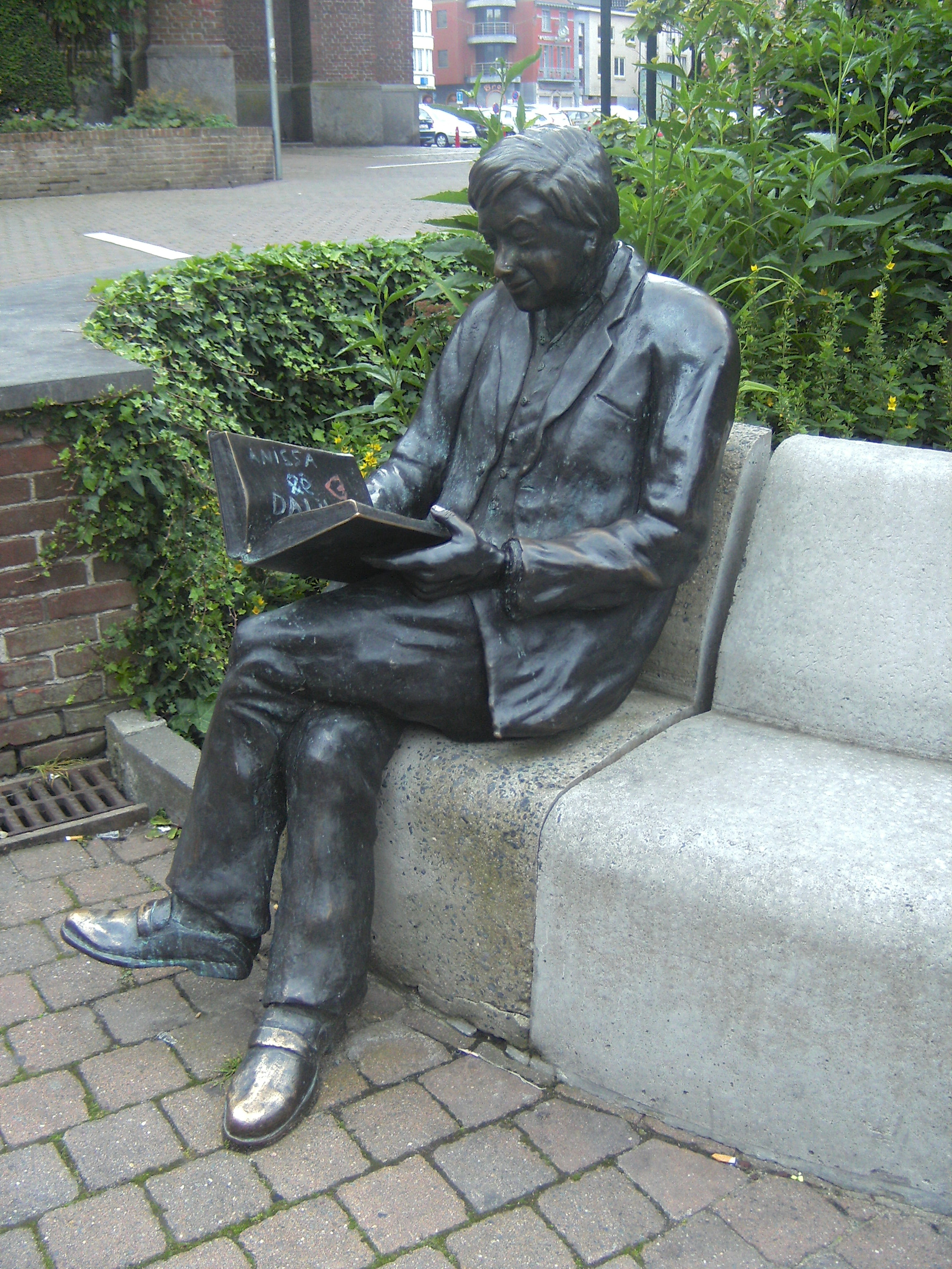 Mouscron (Belgique) - Le lecteur, sculpture de Osvaldo Parise installée à la place Emmanuel de Neckere.